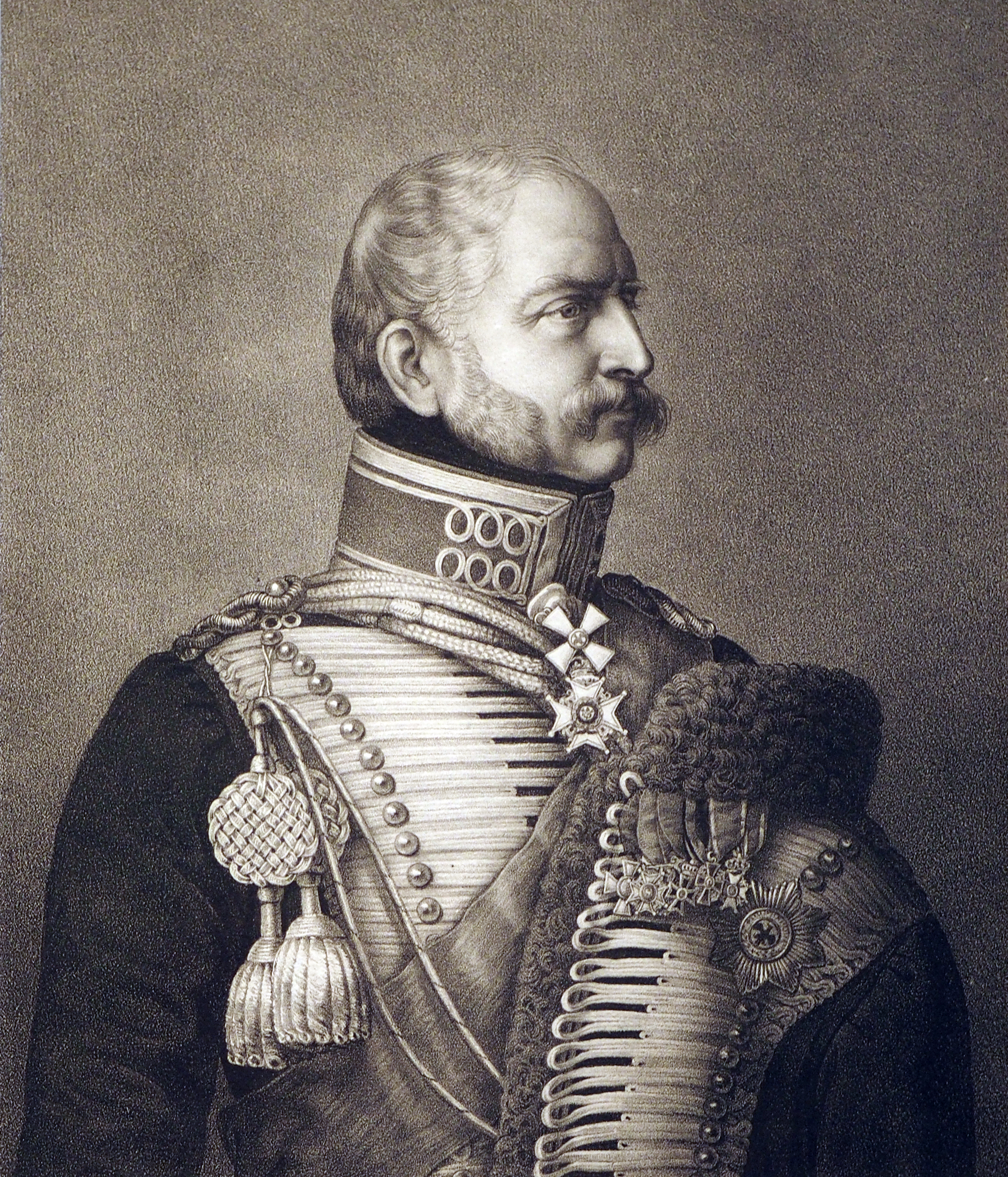 Ernst August, König von Hannover